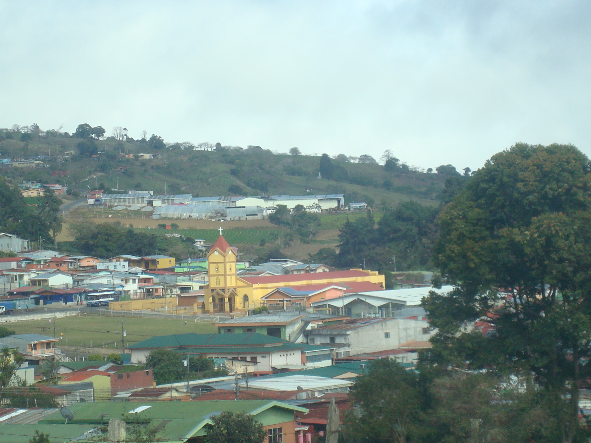 Vista del pueblo de Cot, cantón de Oreamuno, en la provincia de Cartago, Costa Rica.